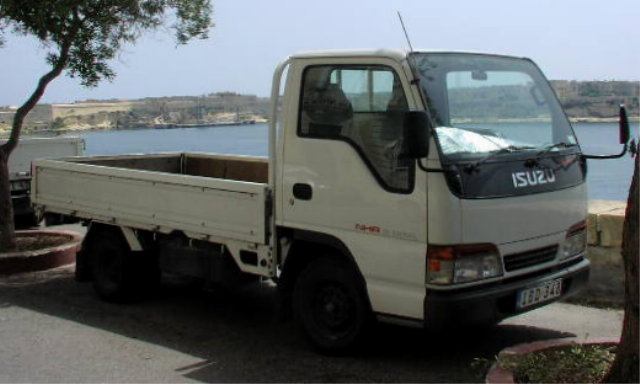 Isuzu NHR 3600 Panel Van